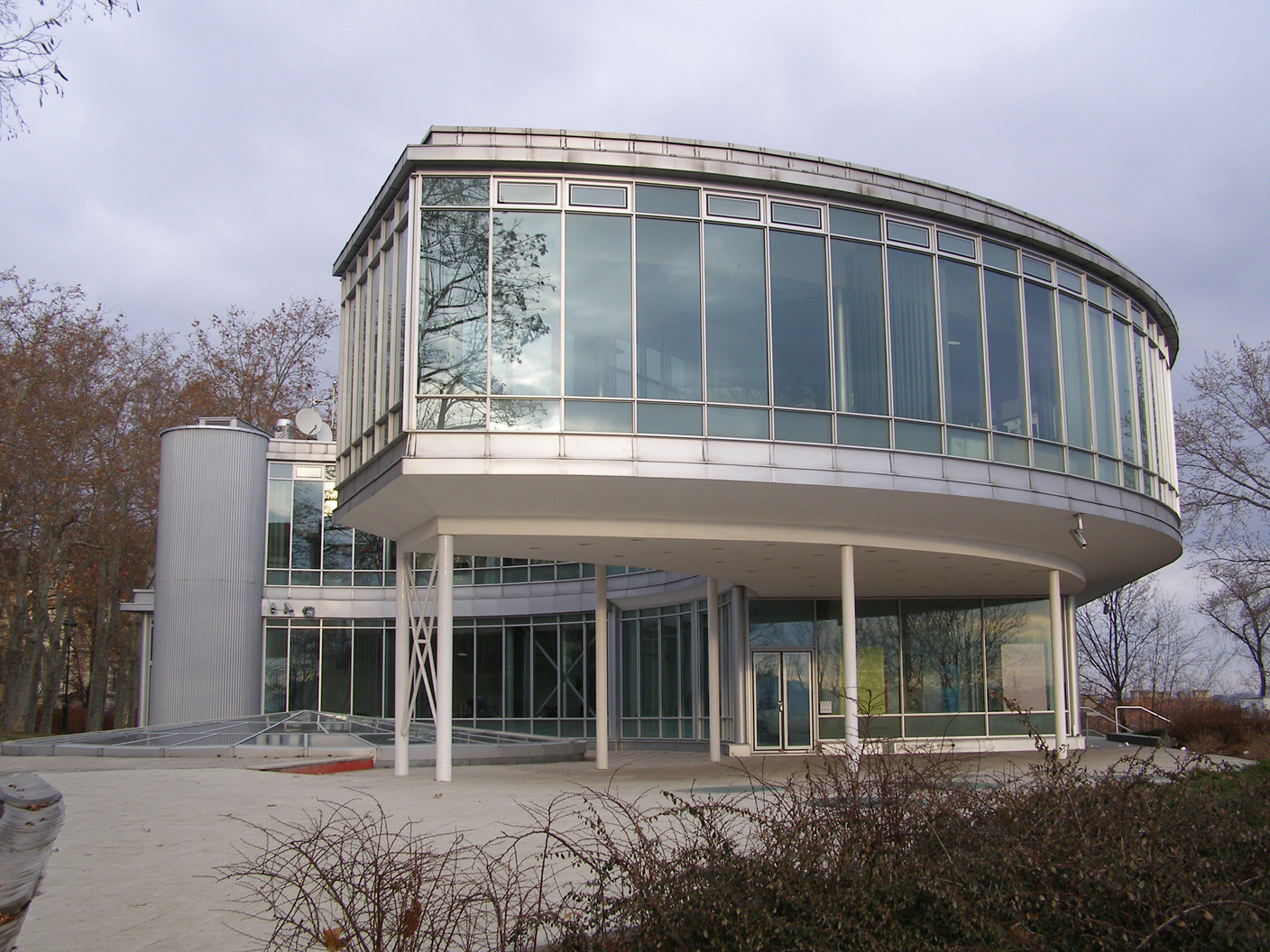 Park - Letenské sady: restaurace Praha - EXPO 58, Praha 7 341, Holešovice